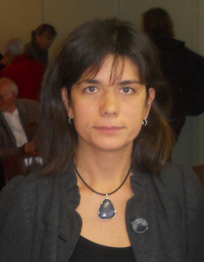 Generals2011 Montse Surroca